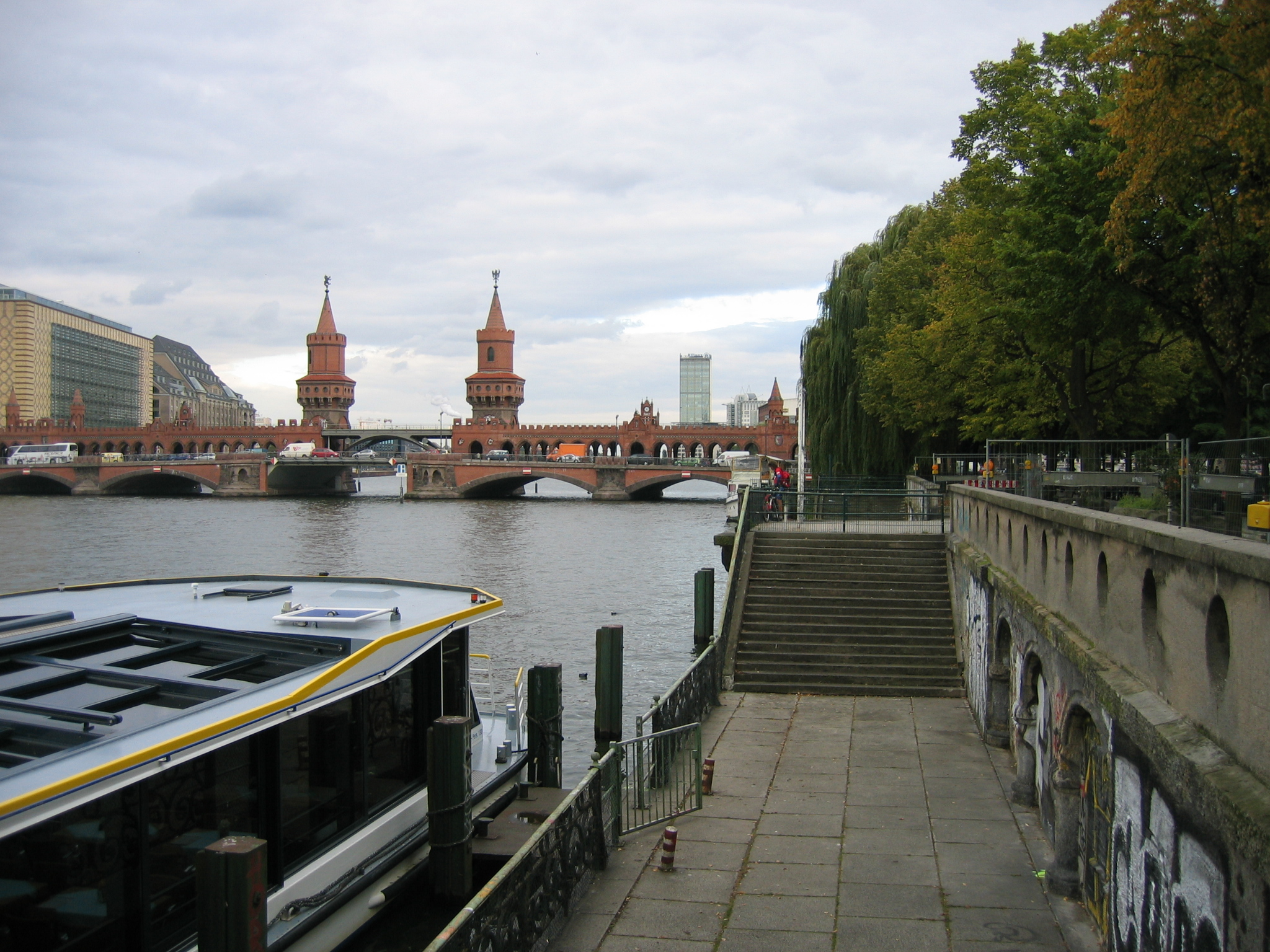 May-Ayim-Ufer (zum Zeitpunkt der Aufnahme noch Gröbenufer), Anliegestelle